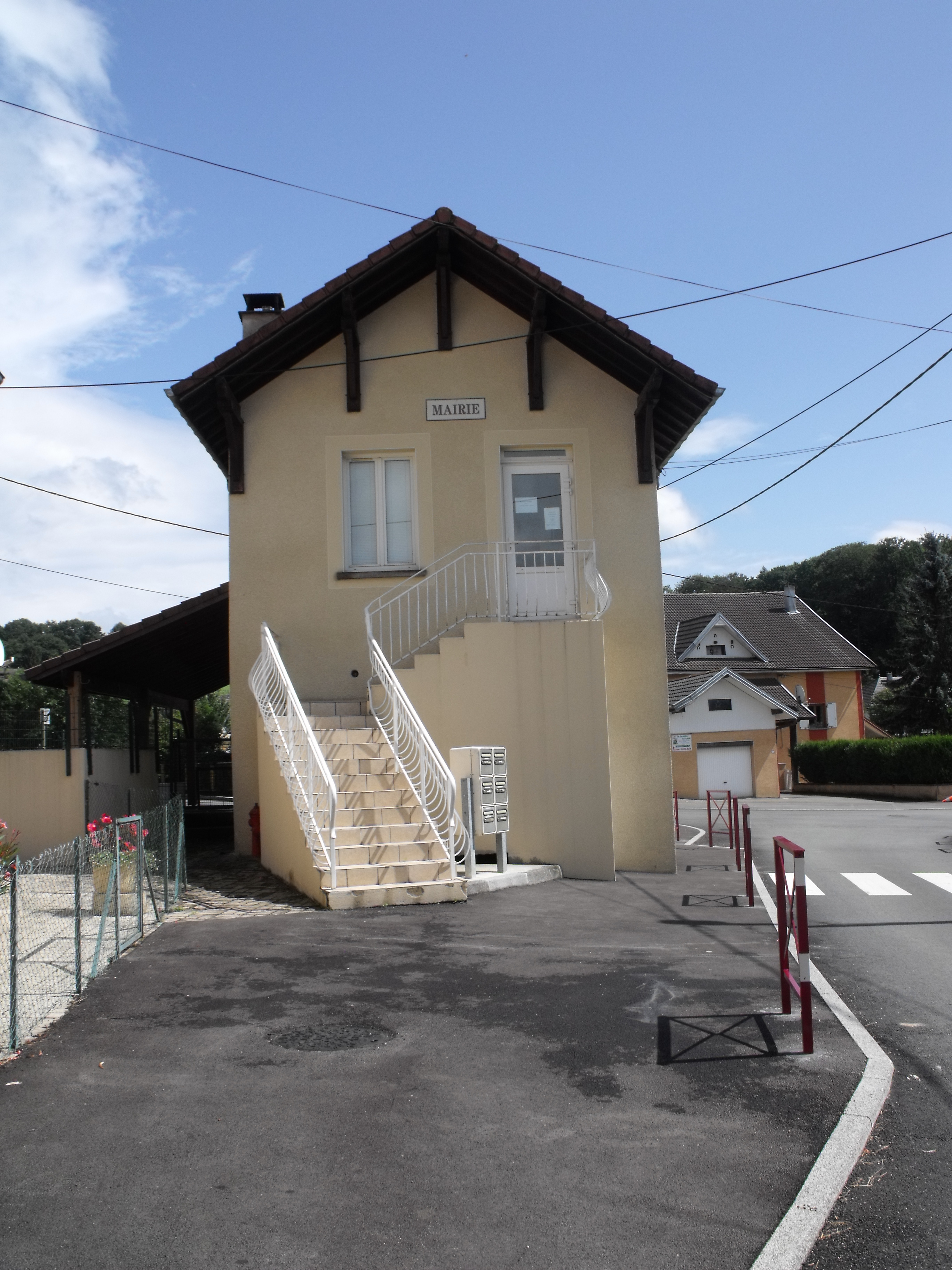 Mairie de Faimbe, Doubs, France